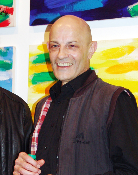 Salomé, Vernissage Galerie Deschler Berlin 2006, fotografiert von Henning von Berg.